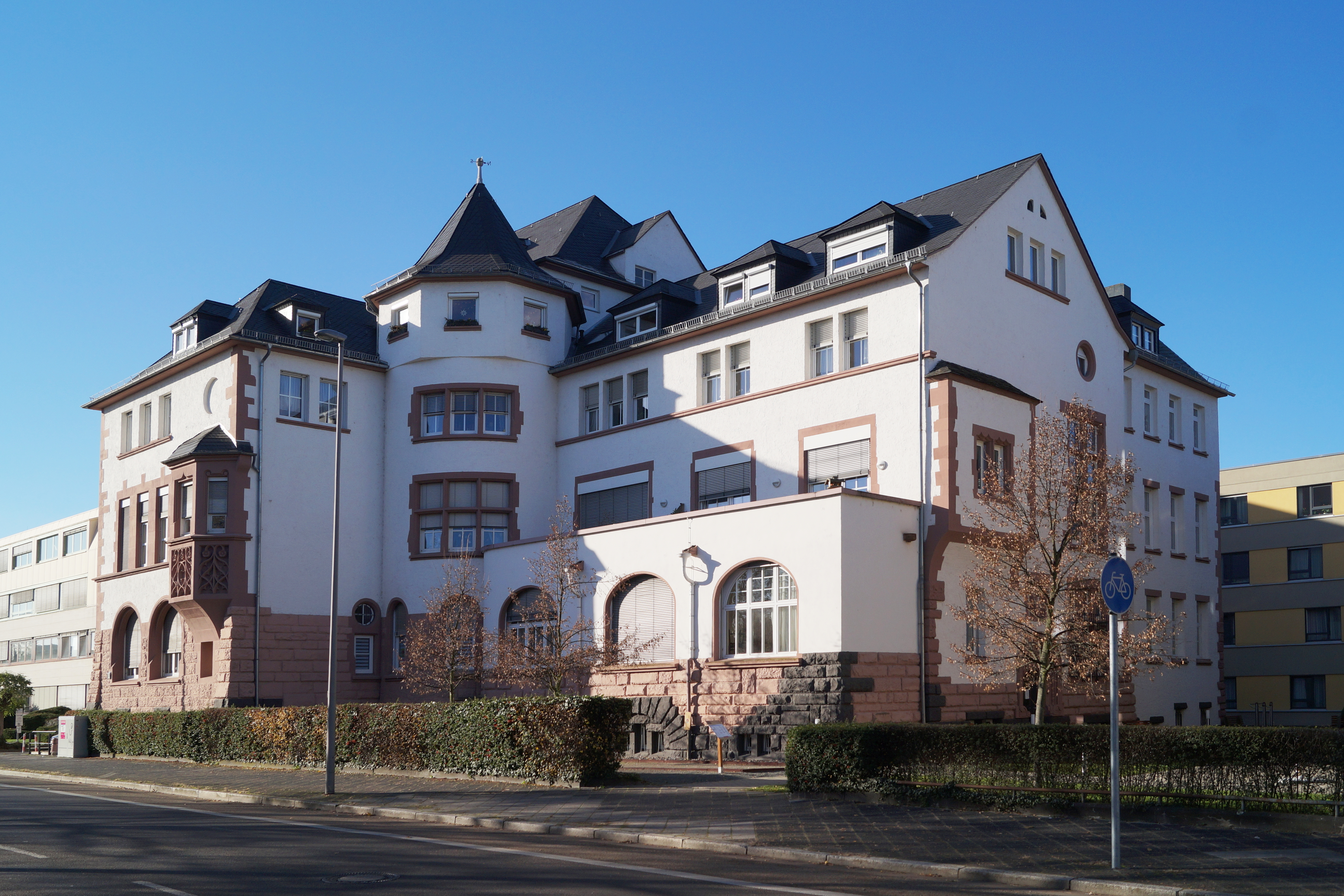 Ehemaliges Landratsamt in Hanau, Eugen-Kaiser-Straße 9